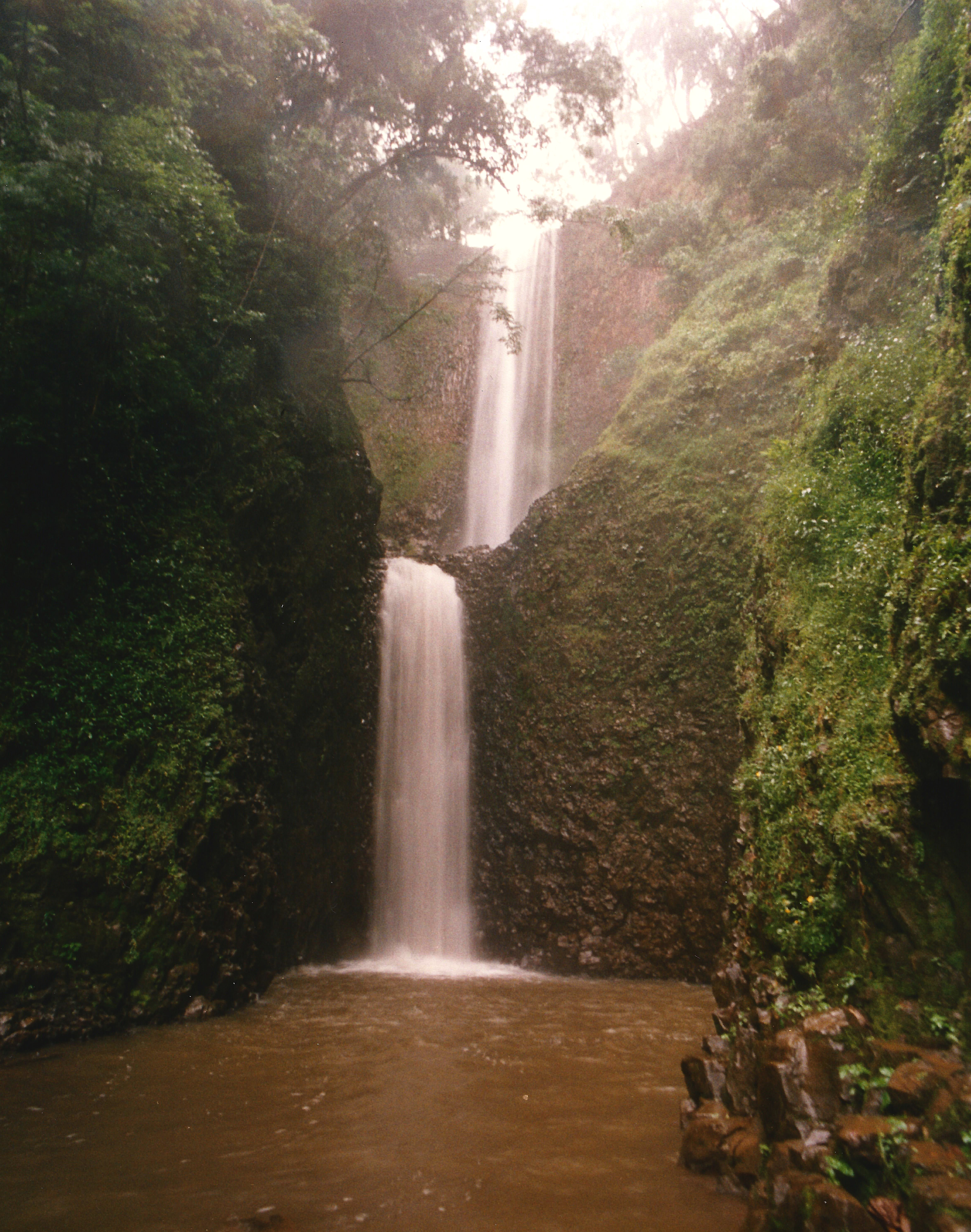 foto da cachoeira cassorova na cidade de brotas-sp